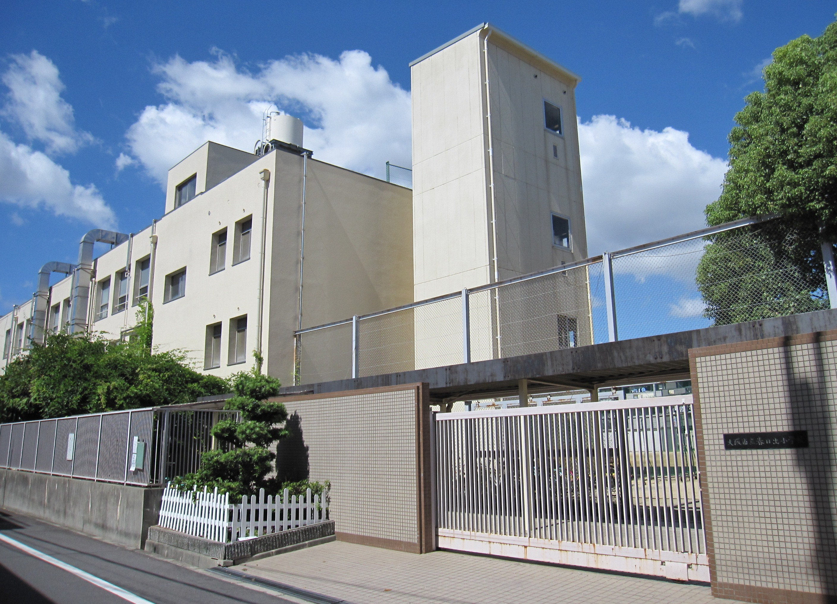 大阪市立春日出小学校